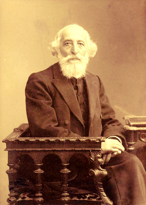 תצלום דיוקנו של הרב ד"ר יצחק רילף: הדפס שחור לבן בתבנית Cabinet card, בגודל 10.5X16.3 ס"מ. תצלום זה הופק בעיר בון, גרמניה. בגב התצלום ציין ד"ר שבדרון כי תצלום זה הוצא מתוך ארכיון דוד וולפסון בשנת 1938, בעת שהיה מופקד בבית הספרים הלאומי.